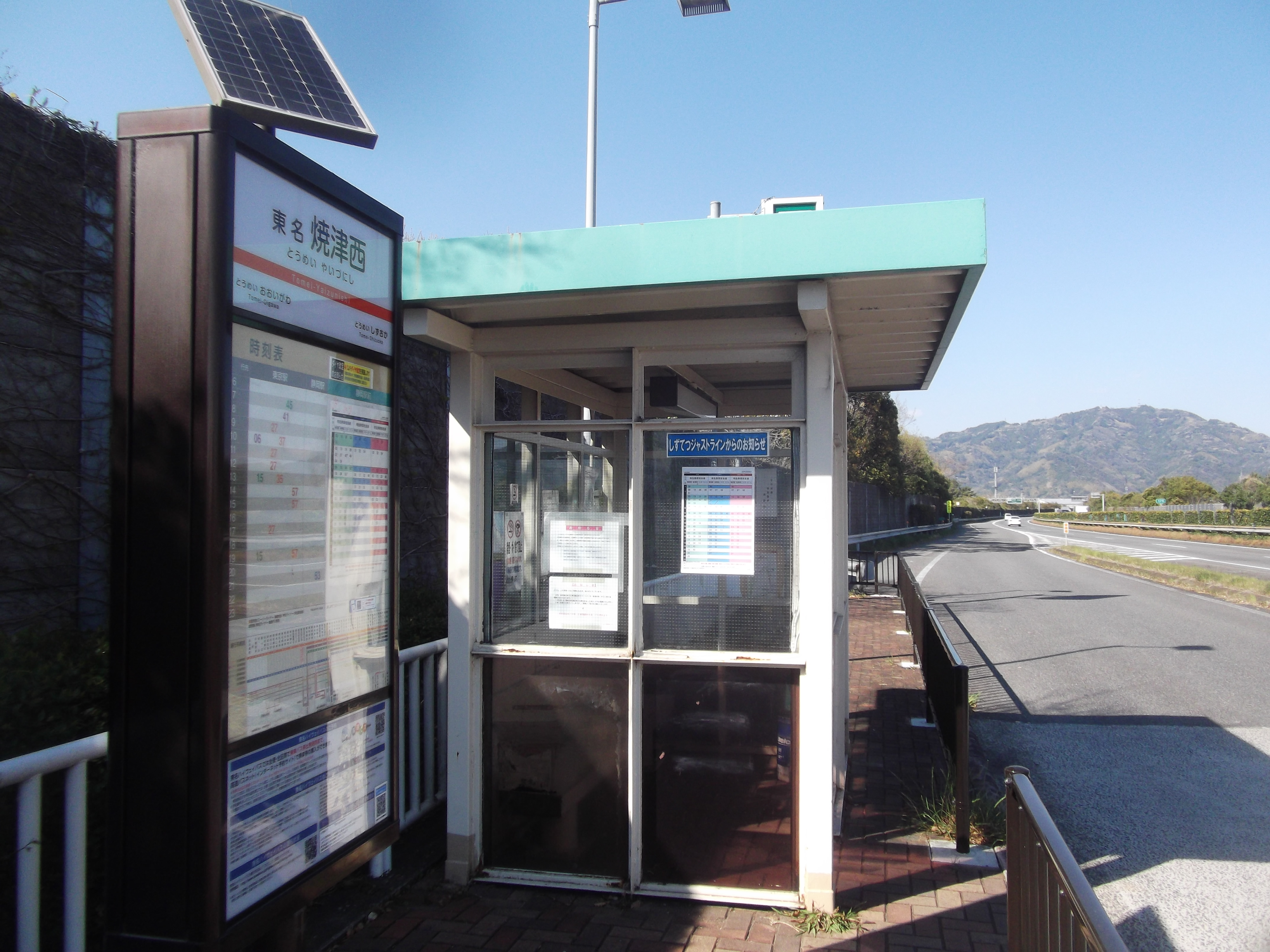 東名焼津西バスストップ上り線